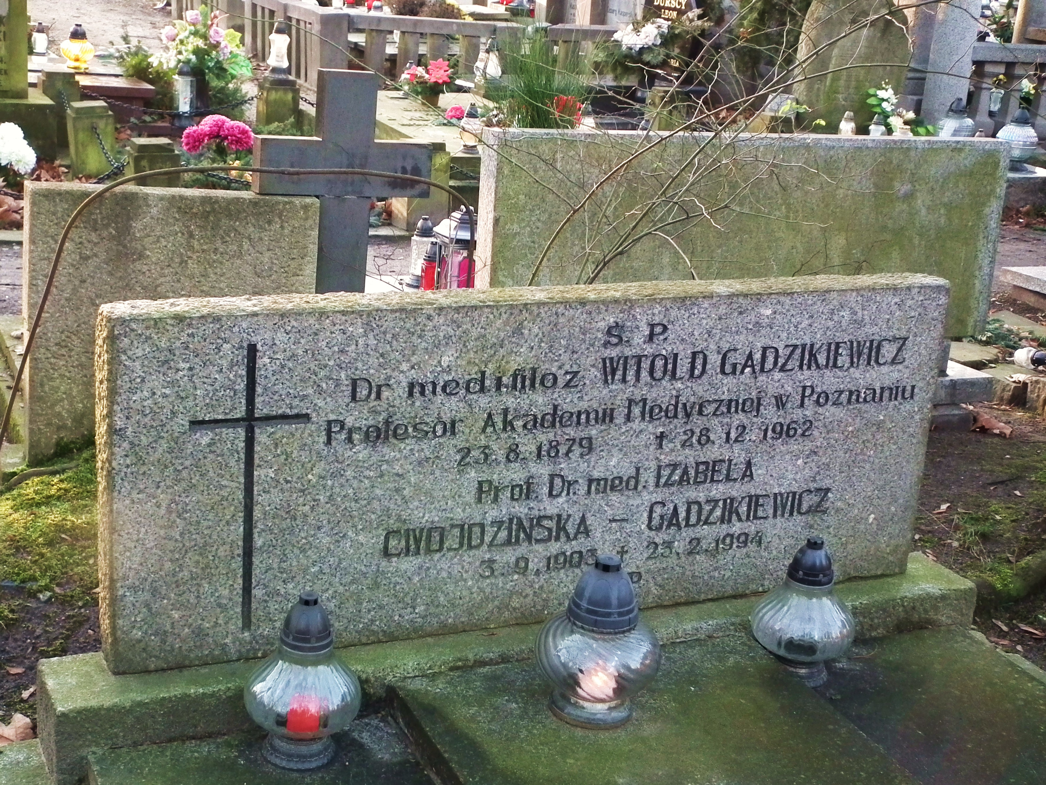 Grób Gądzikiewiczów na cm. górczyńskim w Poznaniu.